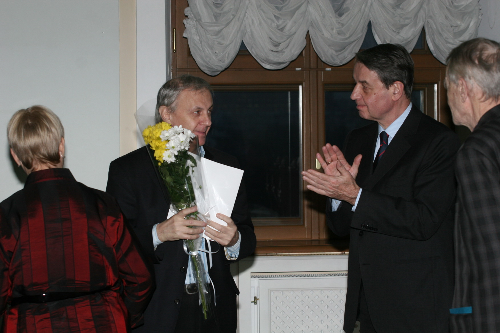 1-го декабря 2011 года в Российской Государственной библиотеке («Дом Пашкова») состоялась торжественная церемония вручения Большой литературной премии России за 2011 год